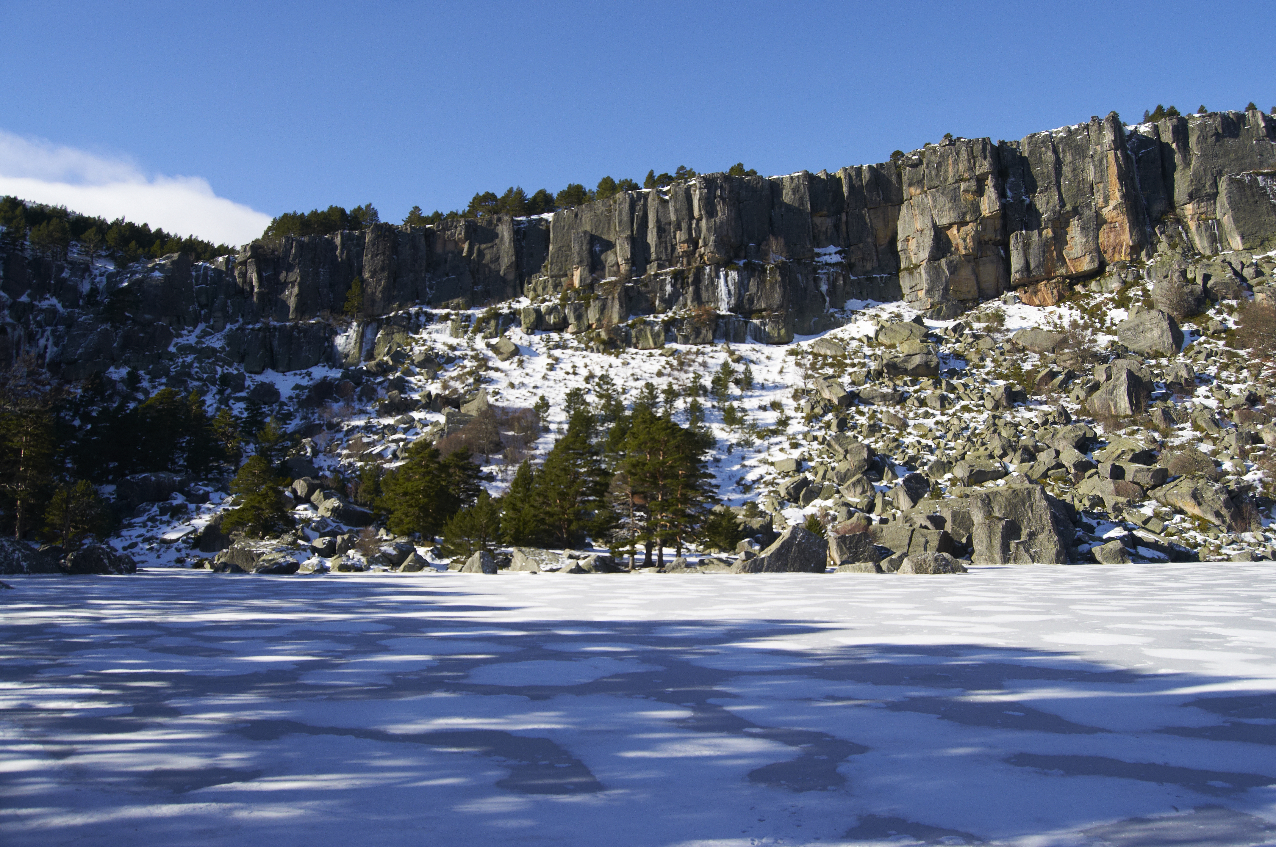 Picos de Urbión, península ibérica.